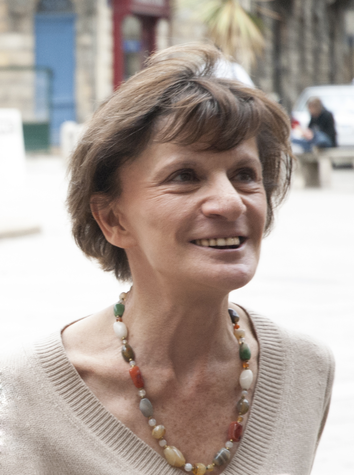 Michèle Delaunay accompagne Najat Vallaud-Belkacem lors d'une séance de dédicace à Bordeaux.